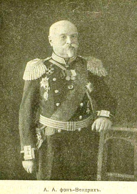 Вендрих, Альфред Альфредович (1848-после 1917) - генерал-лейтенант, военный инженер, Член Правительствующего Сената